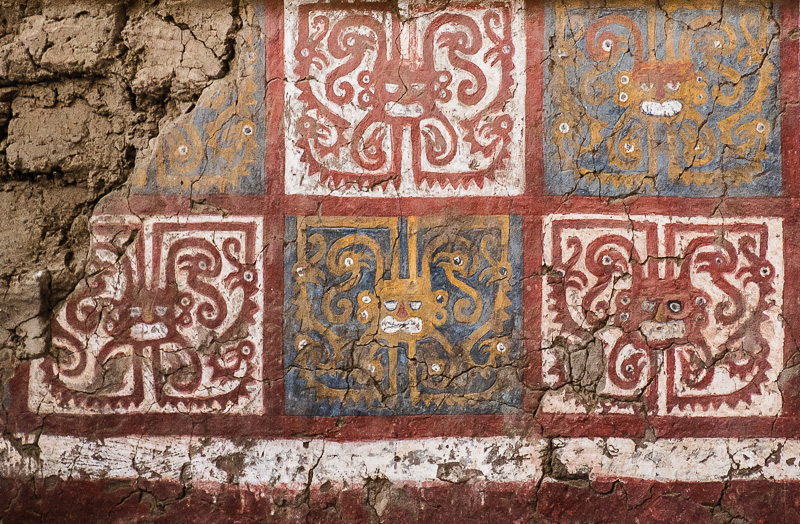 Huaca de la Luna, Trujillo, Perú. © Enrique Jara